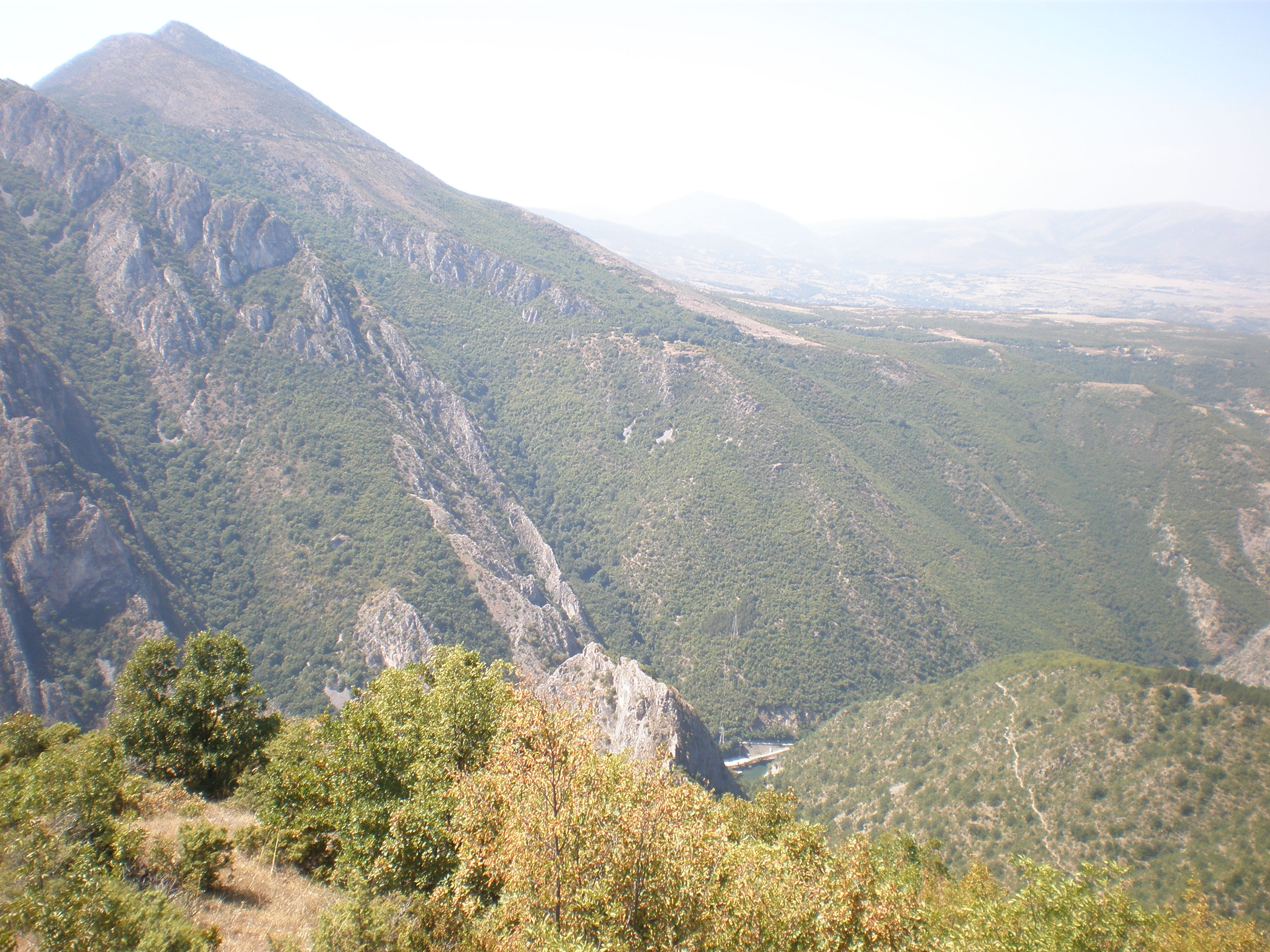 Падината Ивање на планината Осој во кањонот Матка, Македонија